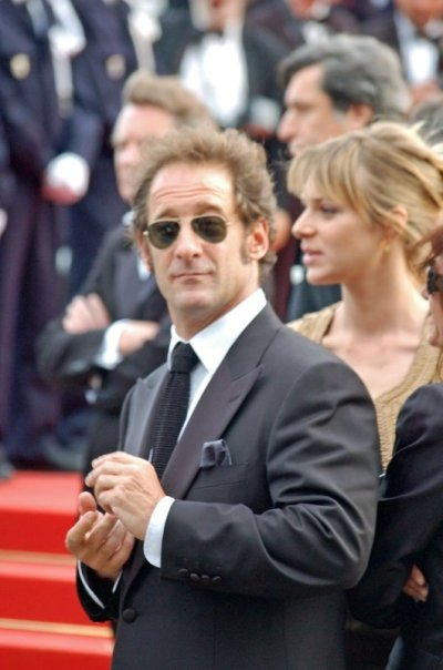 Vincent Lindon au festival de Cannes.